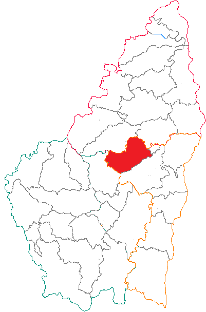 Situation du canton dans le département de l'Ardèche (France)